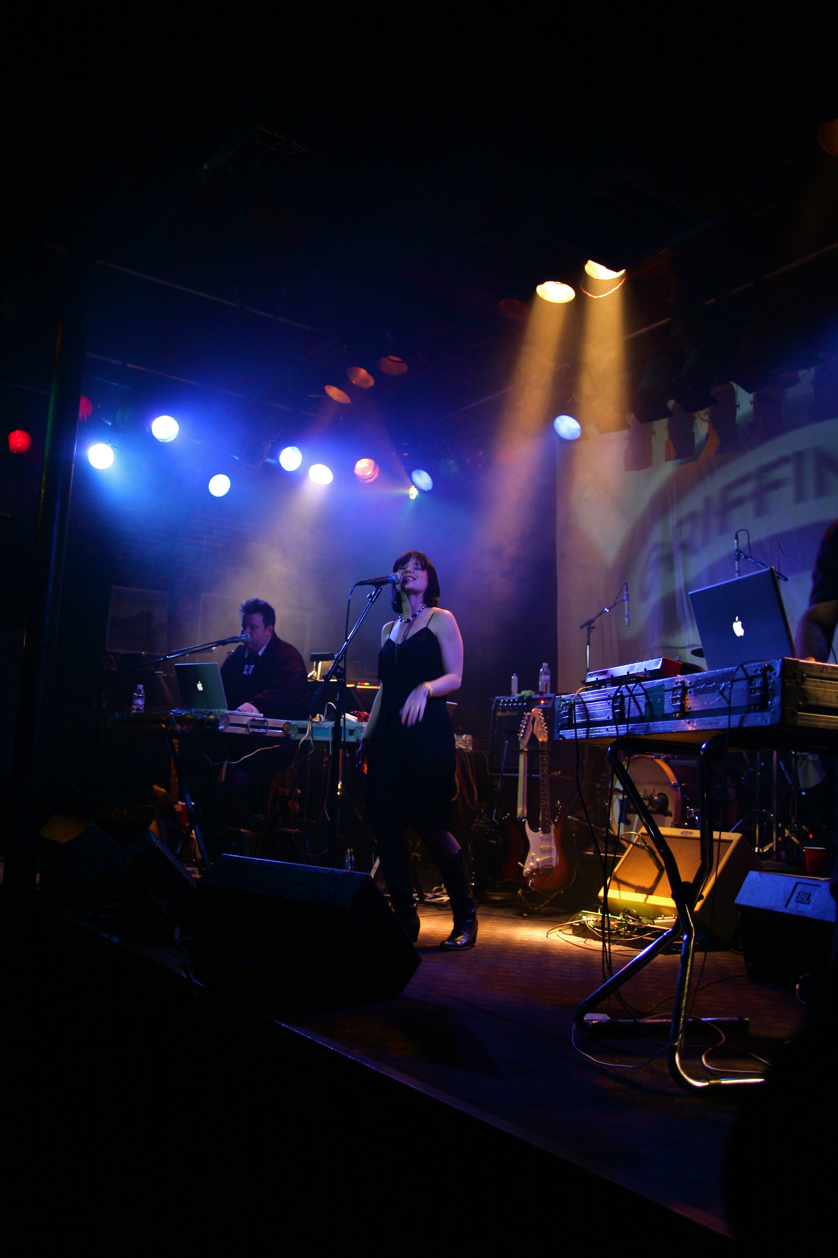 Venus Hum